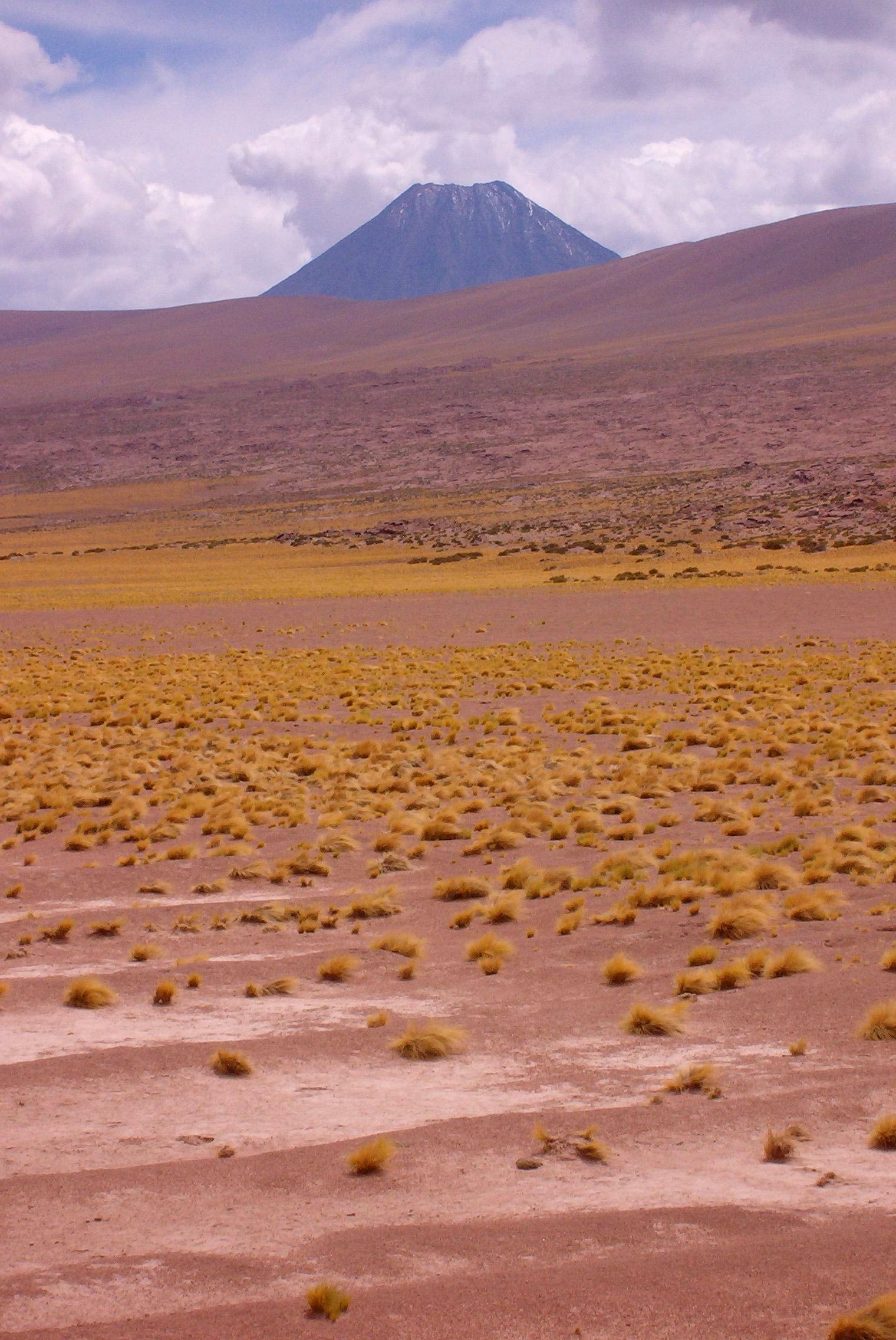 Chiliques Volcano, Chile.